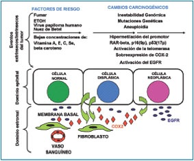 Prostaglandinas y cáncer